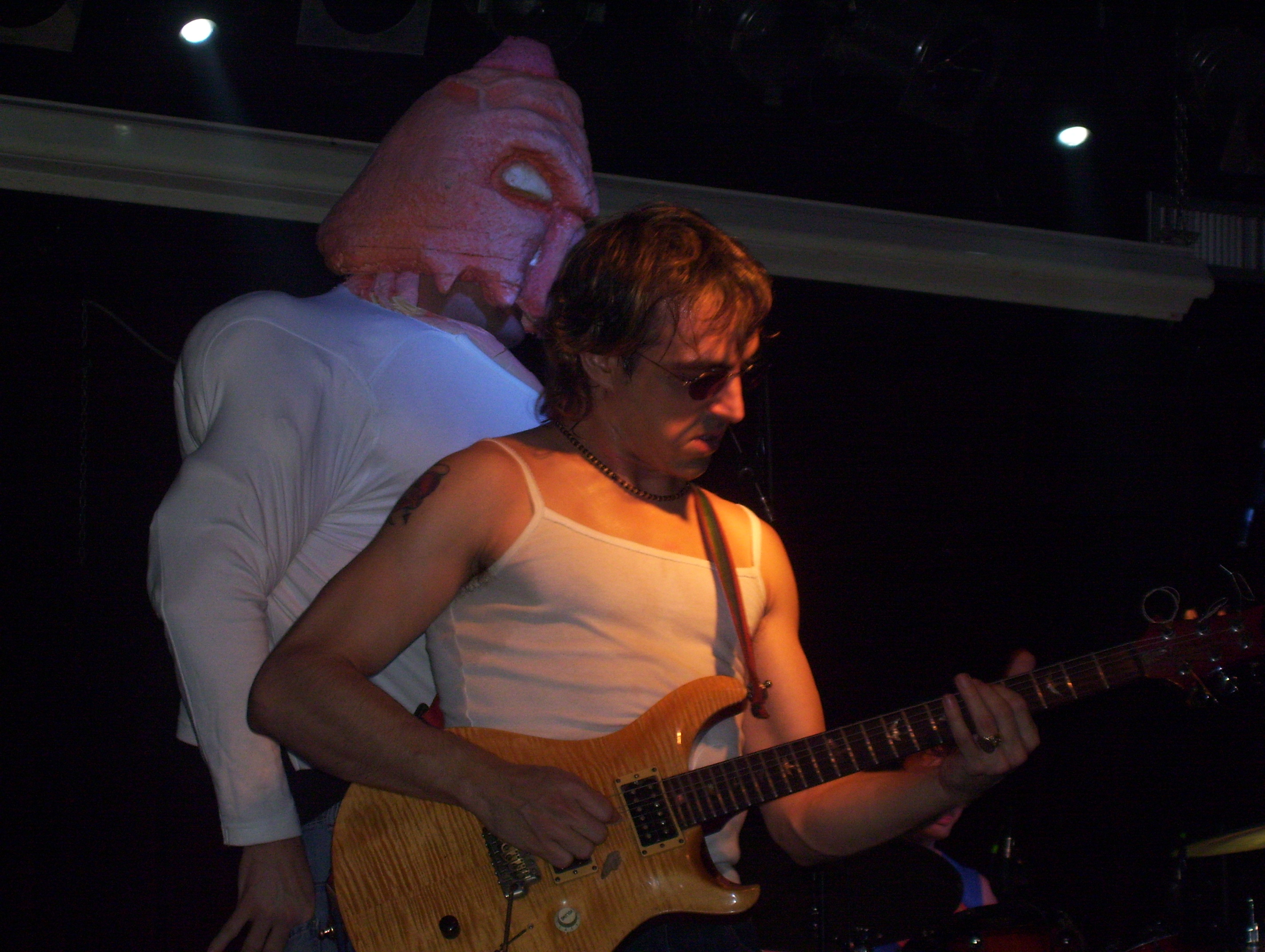 In primo piano Ludovico Piccinini chitarrista dei Prophilax, alle spalle il "Mentulatore" mascotte ufficiale della band dal primo album.